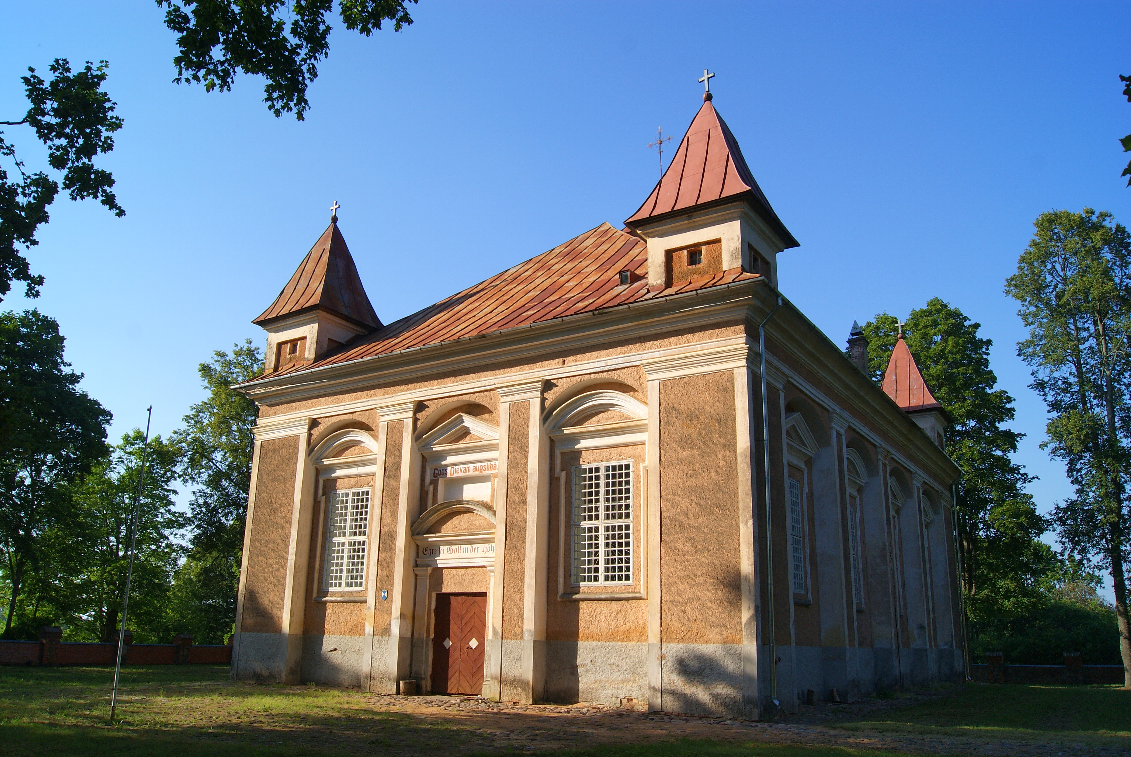 Subates luterāņu baznīca /Church